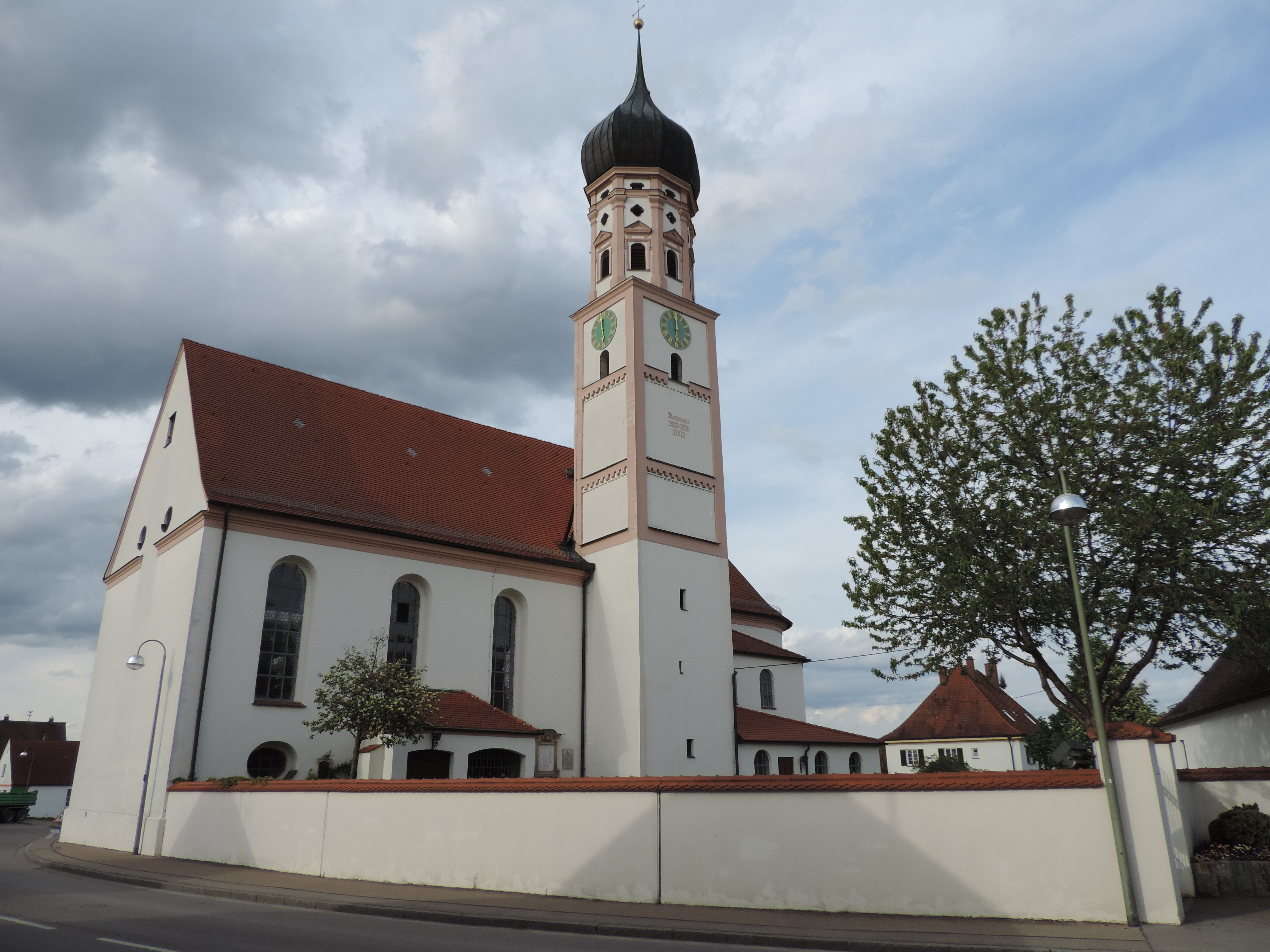 Pfarrkirche, Südseite